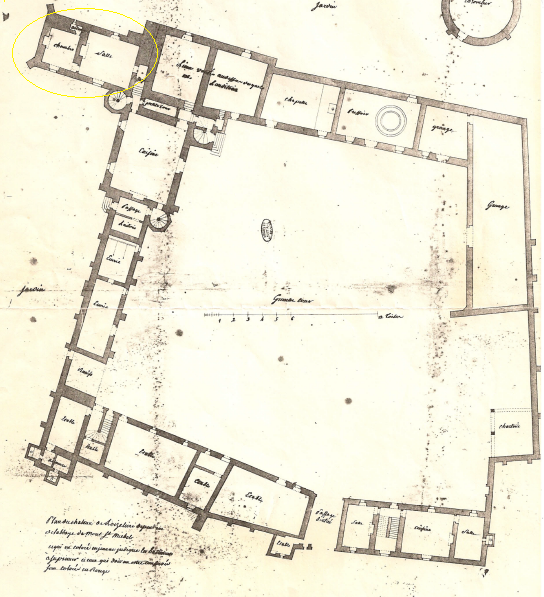 plan de l'Oiselière 1766